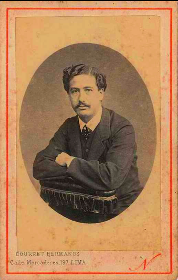 Lima 1866